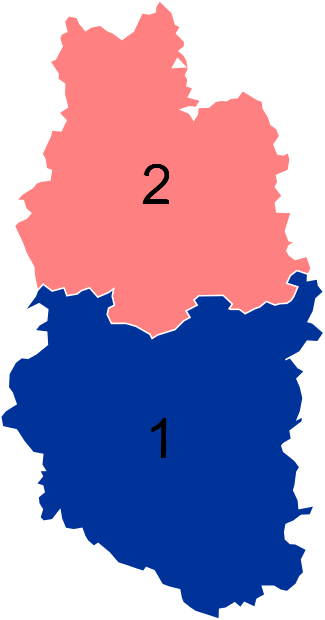 Résultats des élections législatives de la Meuse en 2012